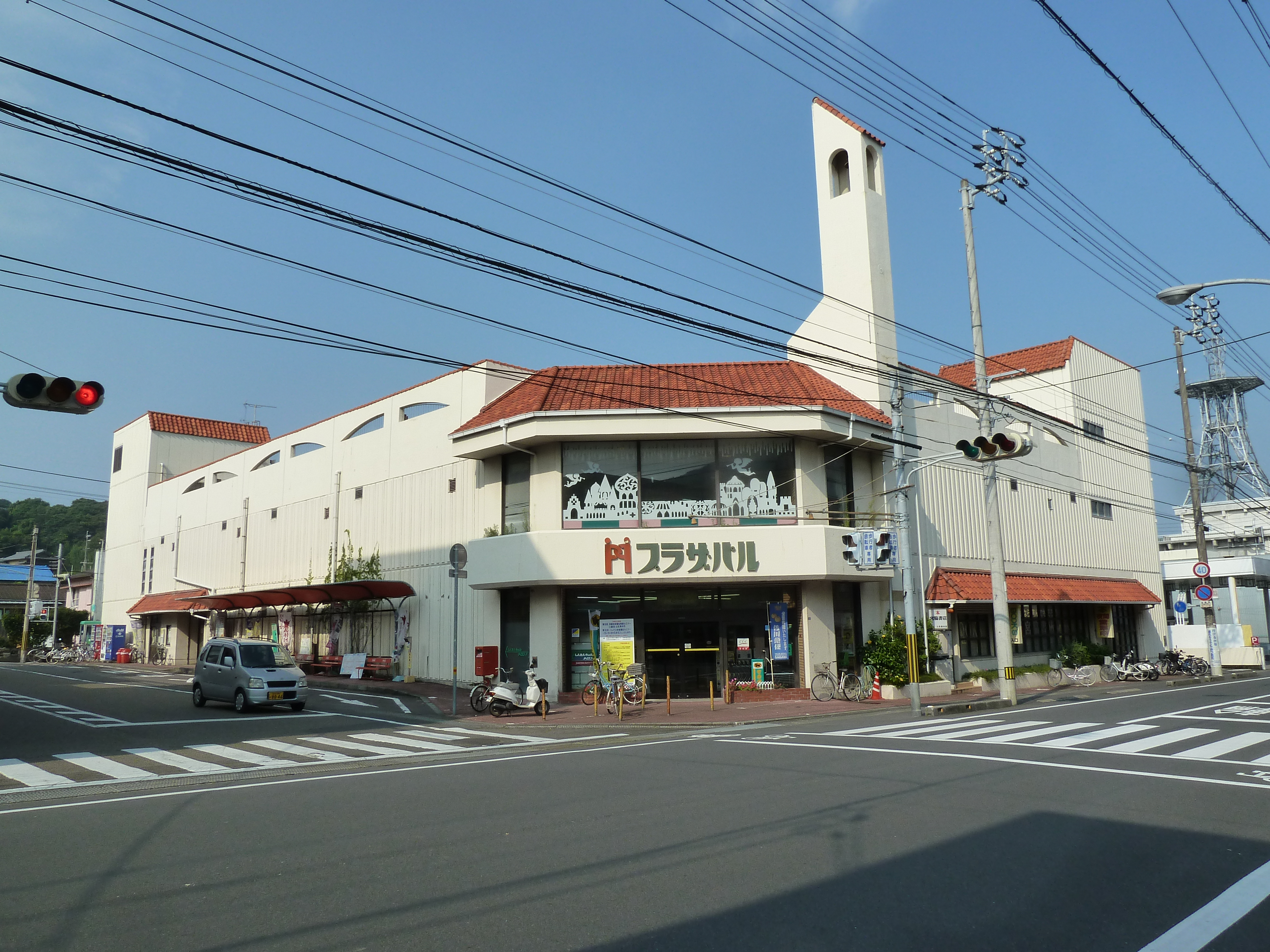 土佐清水市中心部に立地するプラザパル